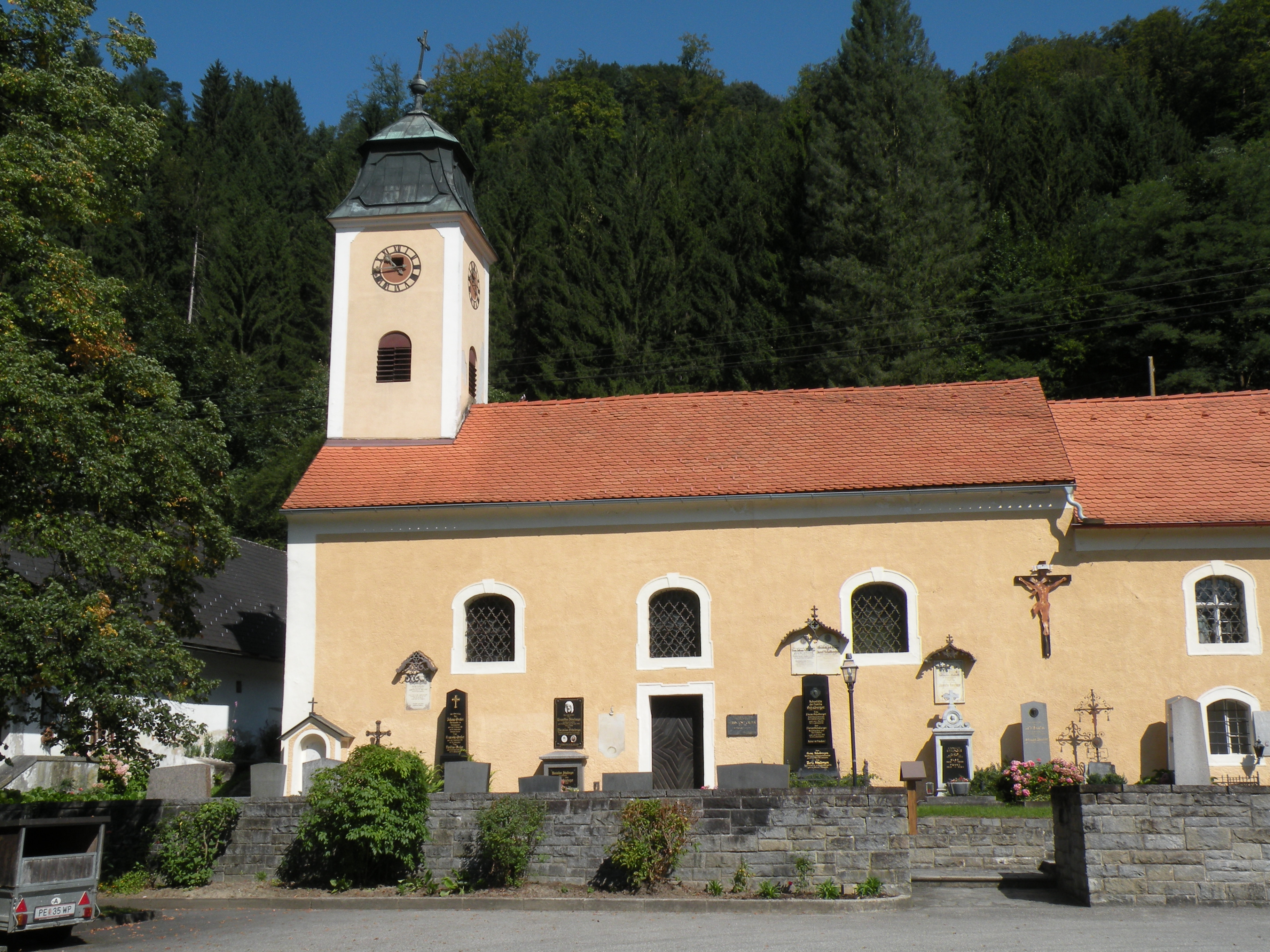 Kath. Filialkirche hl. Kilian und Friedhof